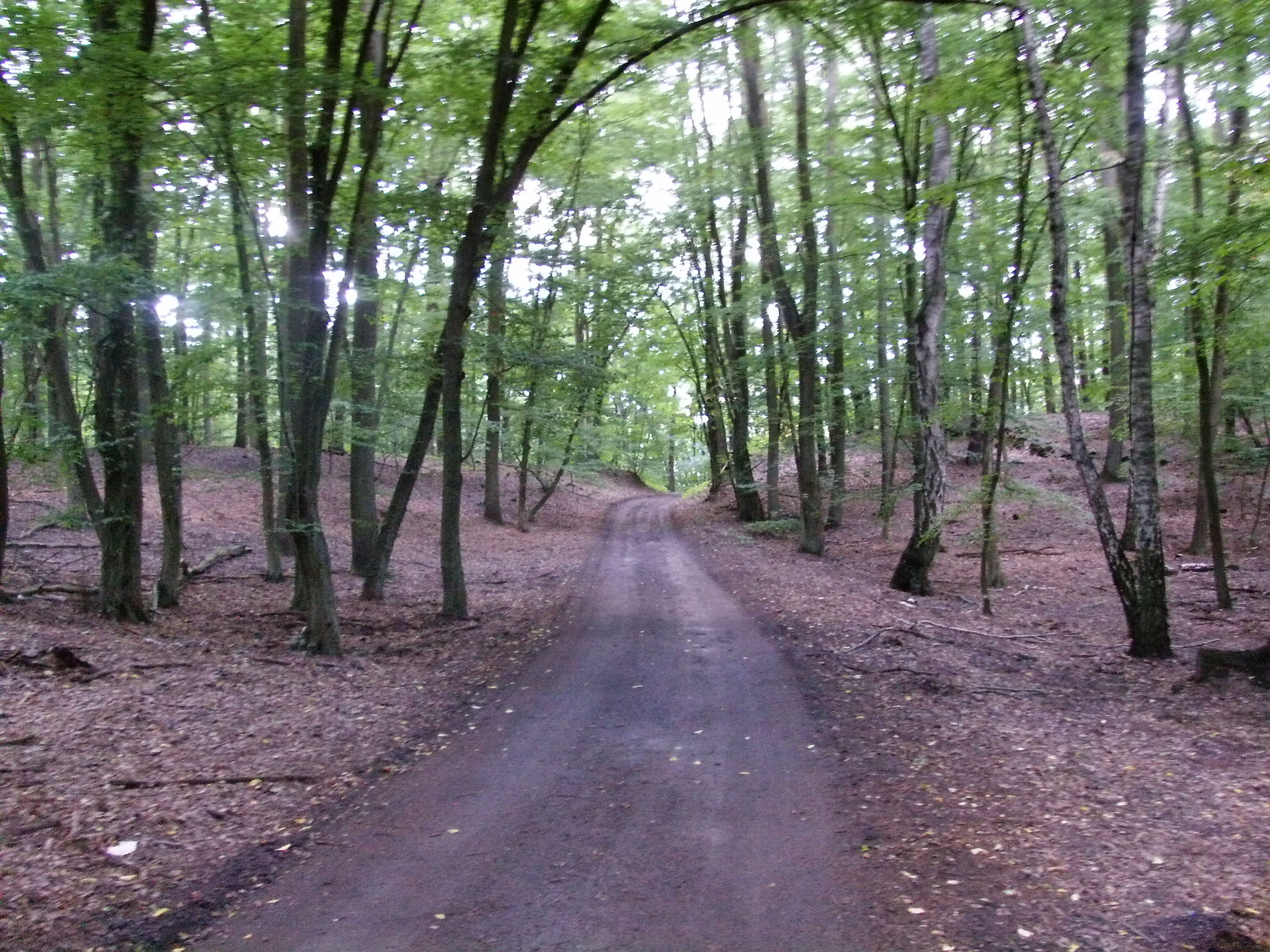 wpn czerwony szlak